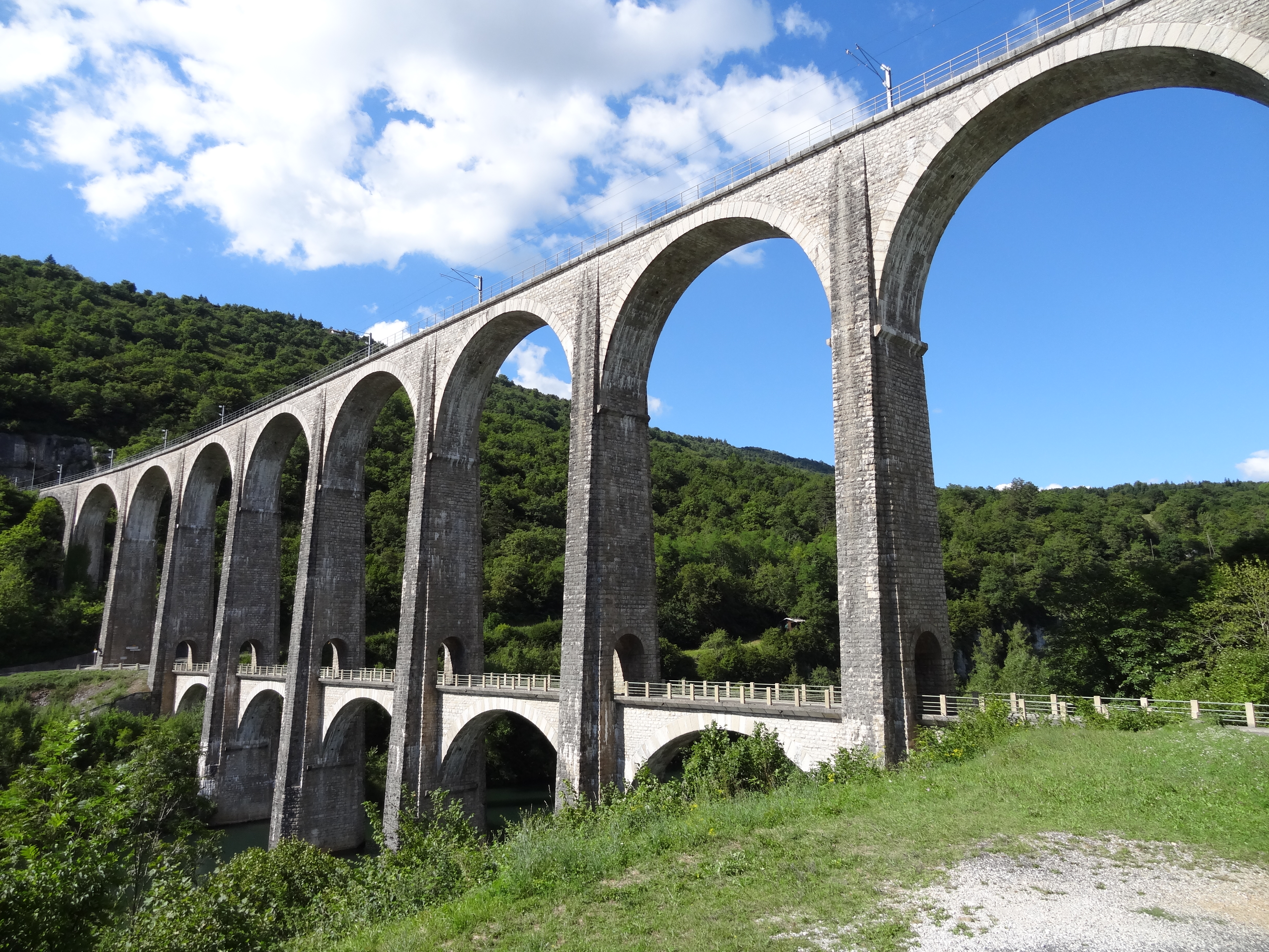 Le viaduc de Cize-Bolozon dans le département de l'Ain en France. Prise de vue depuis la rive gauche de la rivière d'Ain, en aval du viaduc.